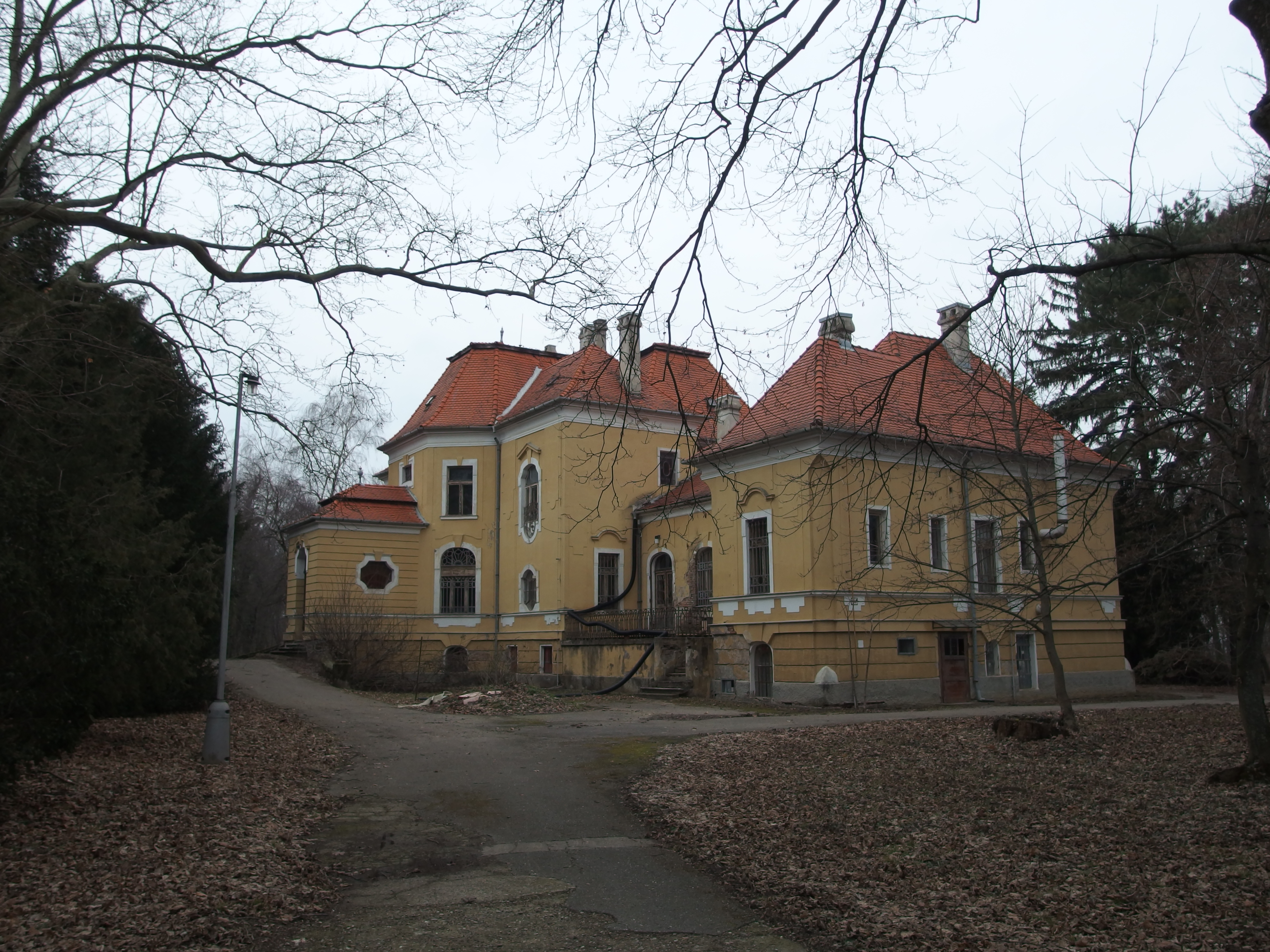 Kaštieľ v obci Báb